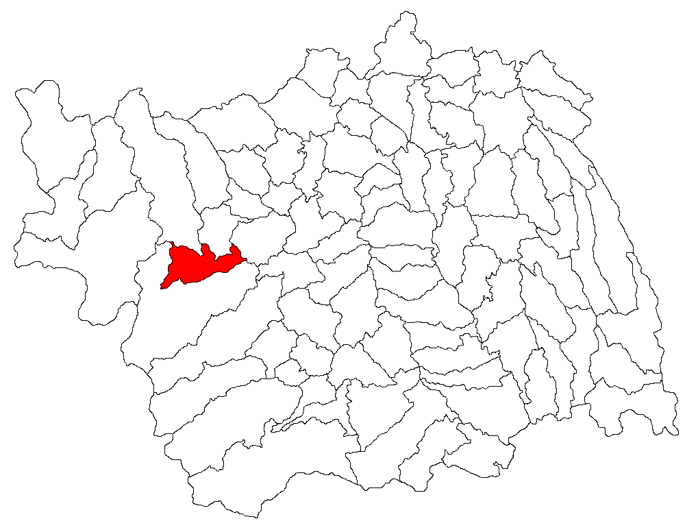 Categorie:Hărţi ale judeţului Bacău